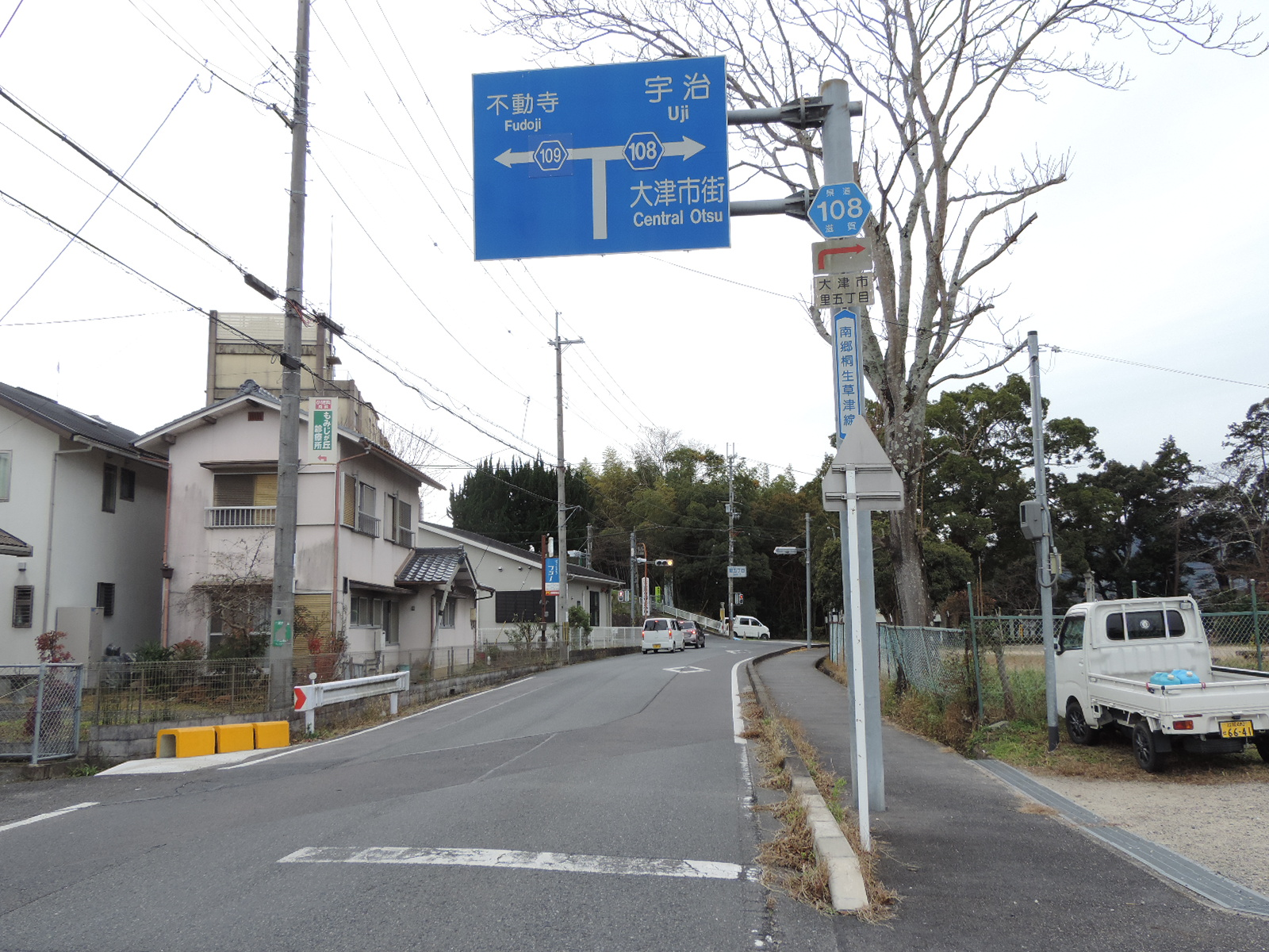 滋賀県大津市里5丁目のja:滋賀県道108号南郷桐生草津線。次の交差点でja:滋賀県道109号不動寺本堂線が分岐。